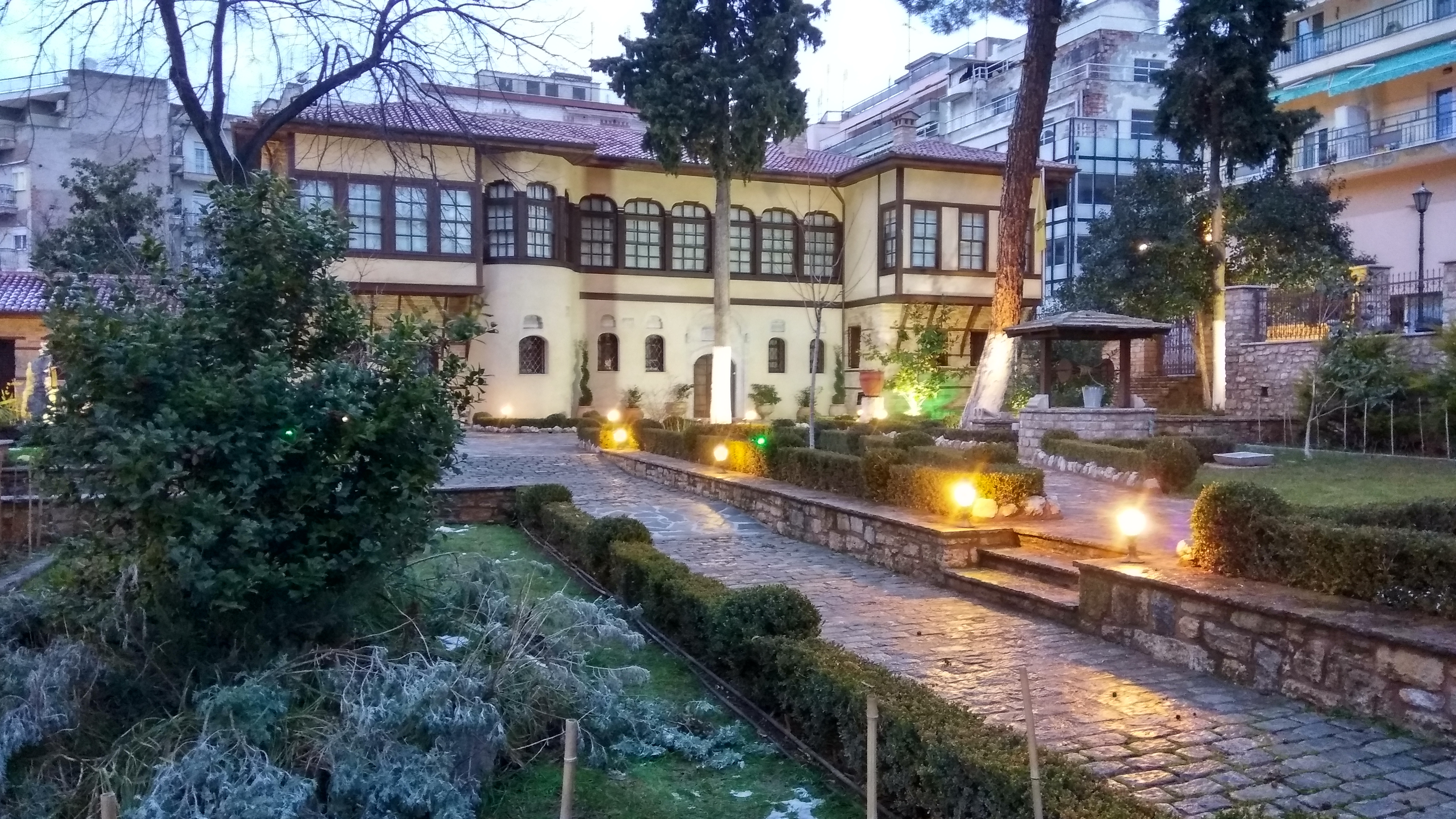 Μητροπολιτικό Μέγαρο Κοζάνης«Μητροπολιτικό Μέγαρο Κοζάνης»